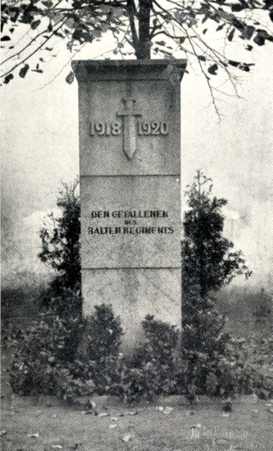 Balti pataljoni mälestussammas